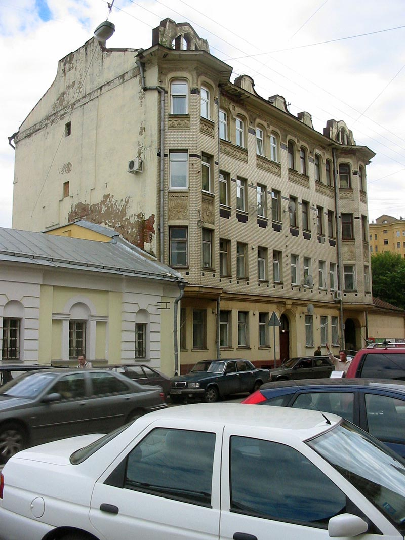 61, Sadovnicheskaya Street, Moscow